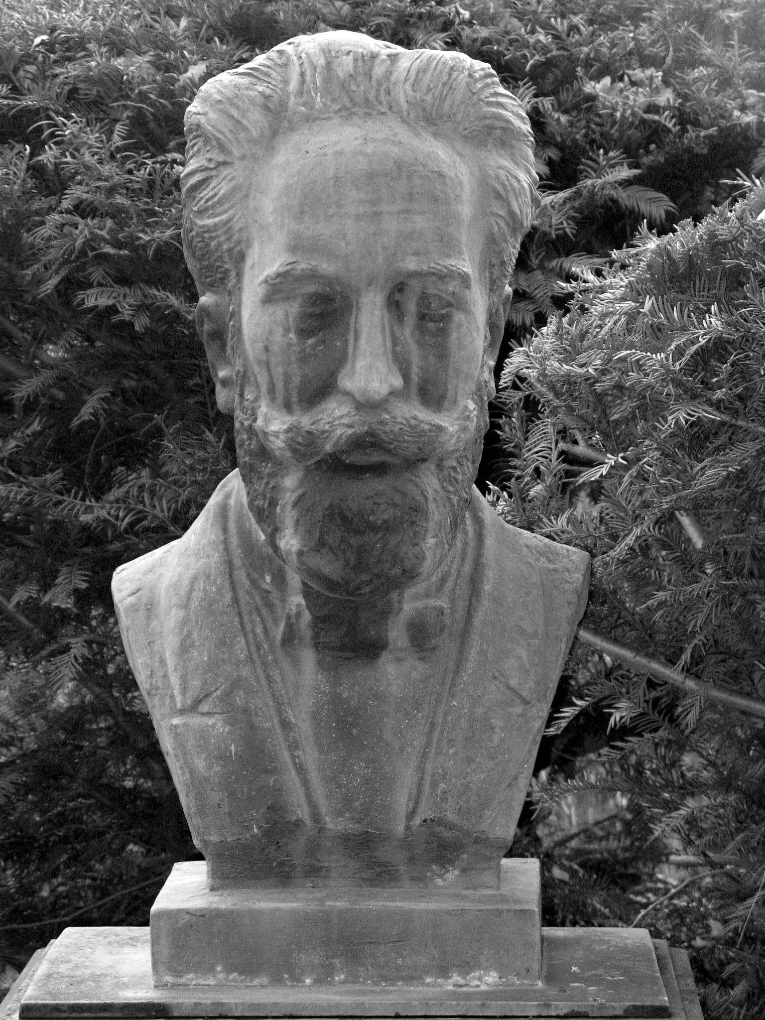 Bildnis Franz Mannstädts